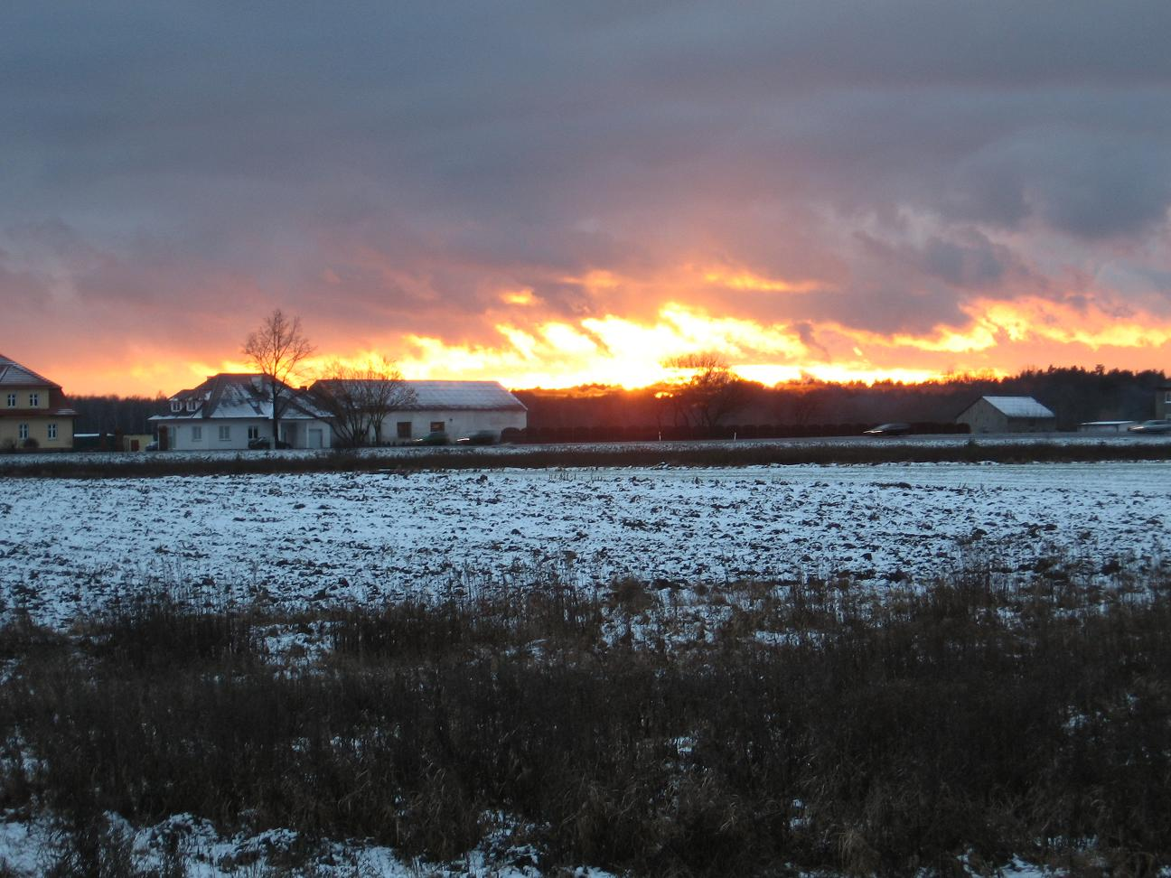 Czarnowo.